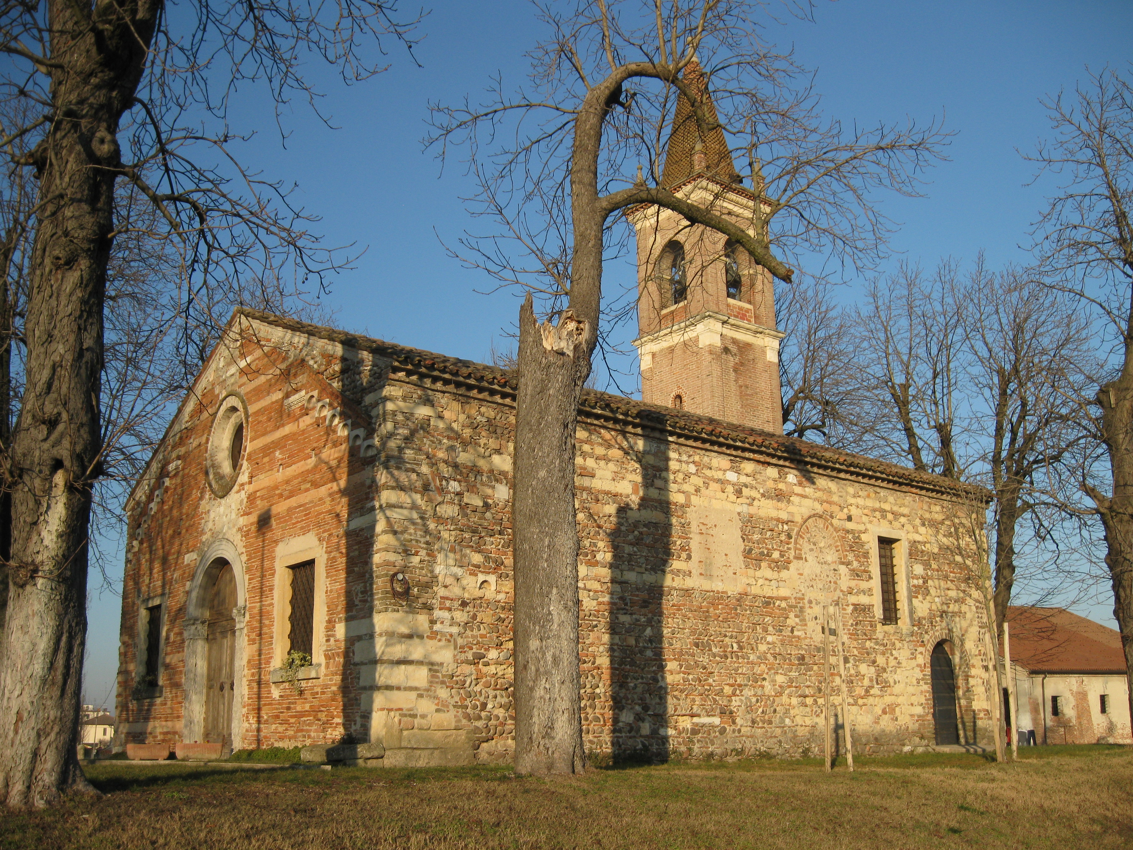 Santuario della Bastìa, Isola della Scala, Italien